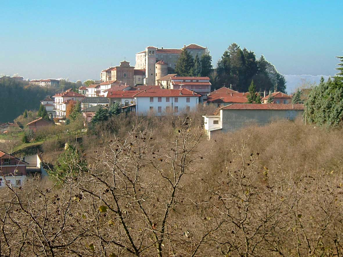 Cravanzana CN